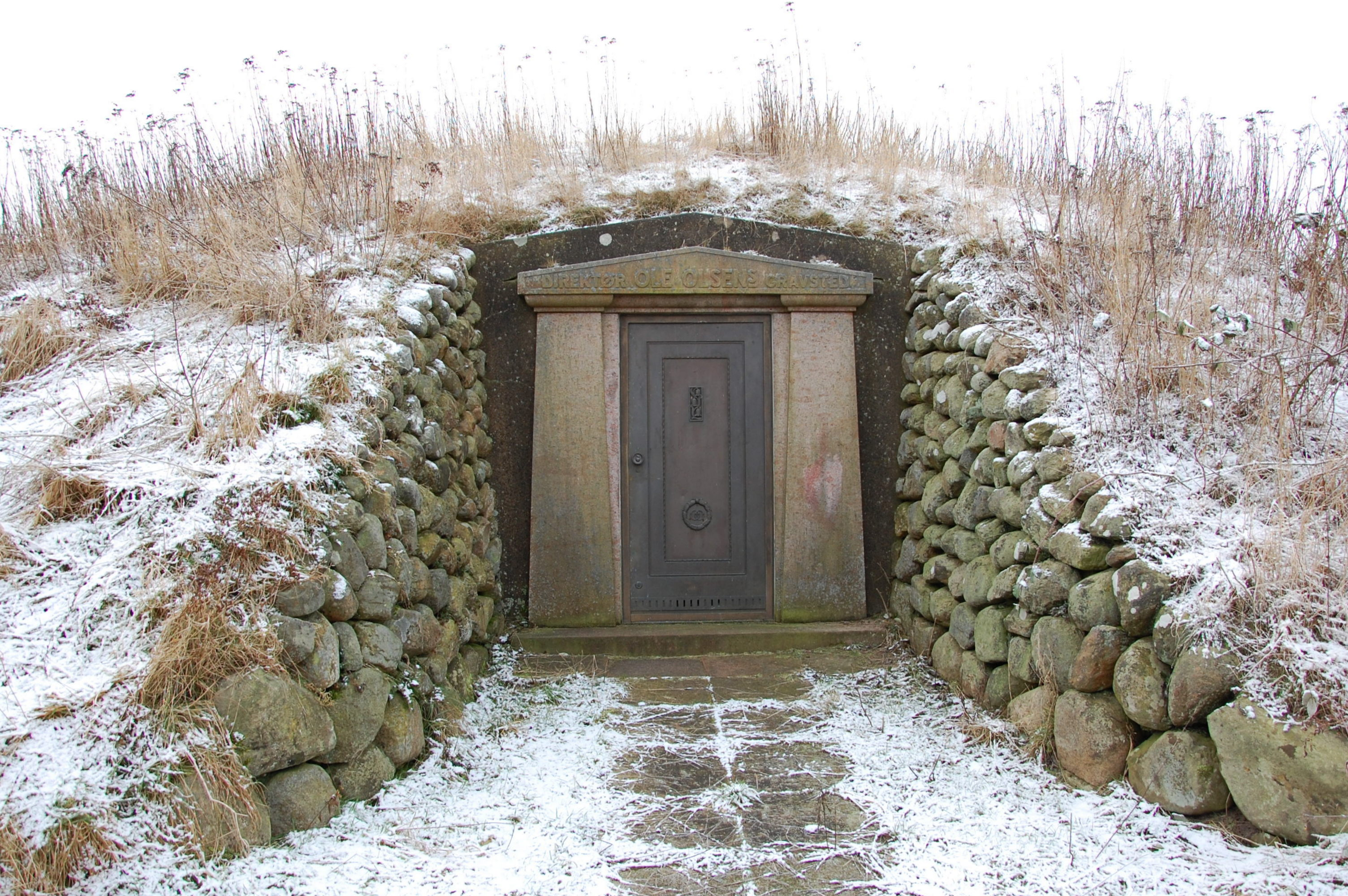 Olsens Grabhügel auf dem Esterhoj